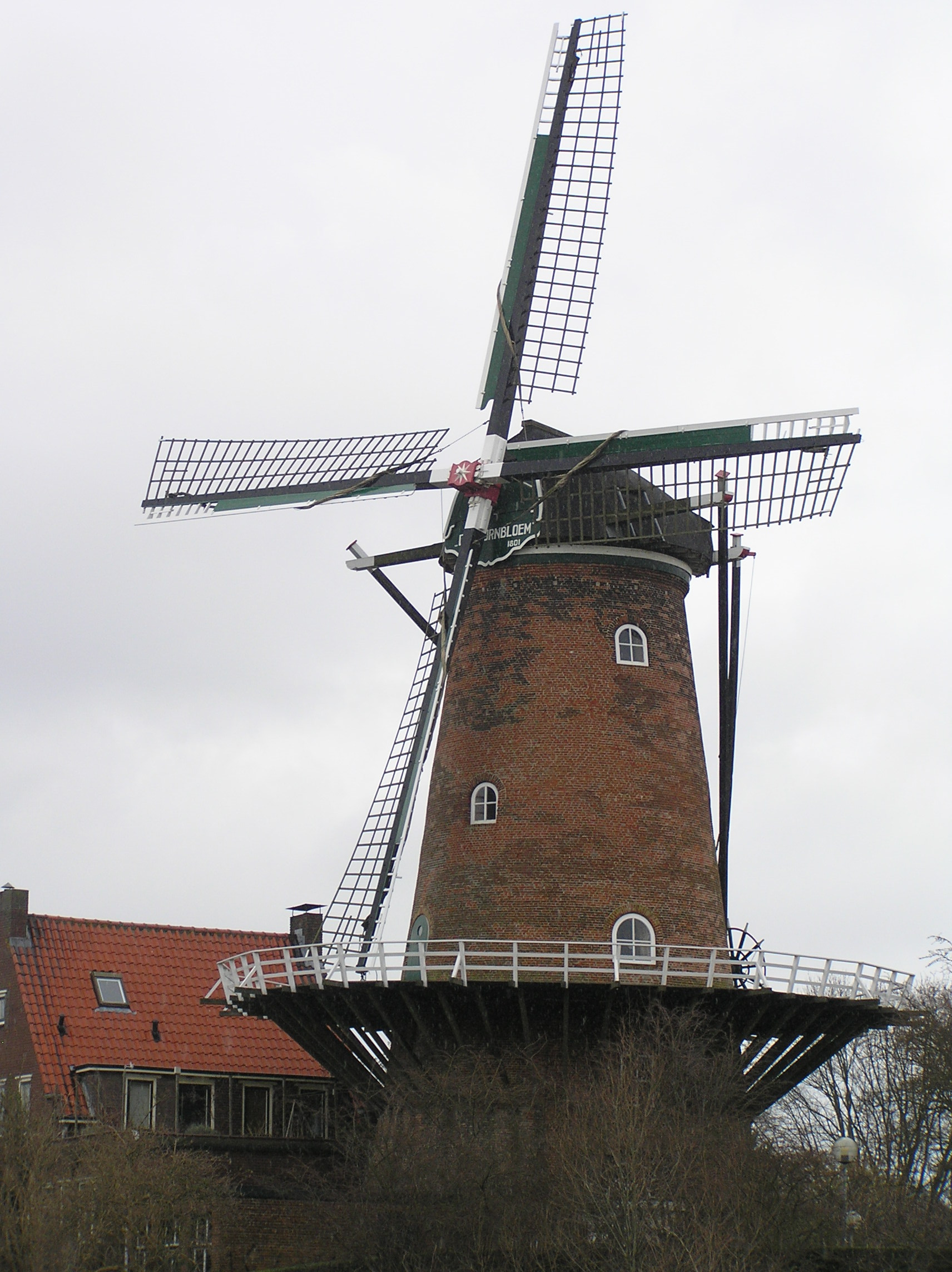 Windmill "de Koornbloem" in Goes.